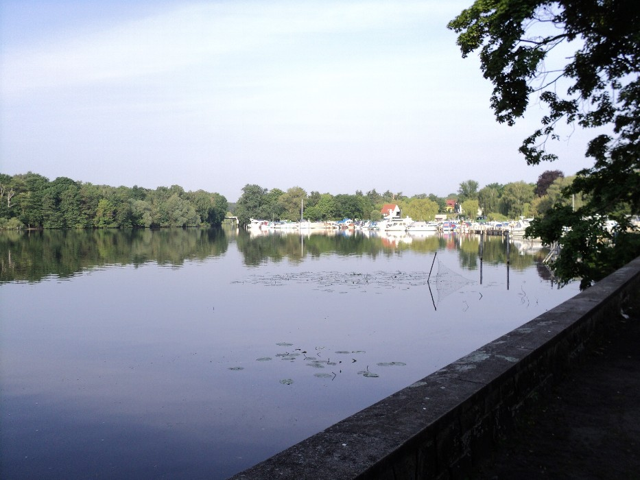 Wannseeforum, Uferpromenade am Pohlesee, einem südwestlichen Ausläufer des Wannsees